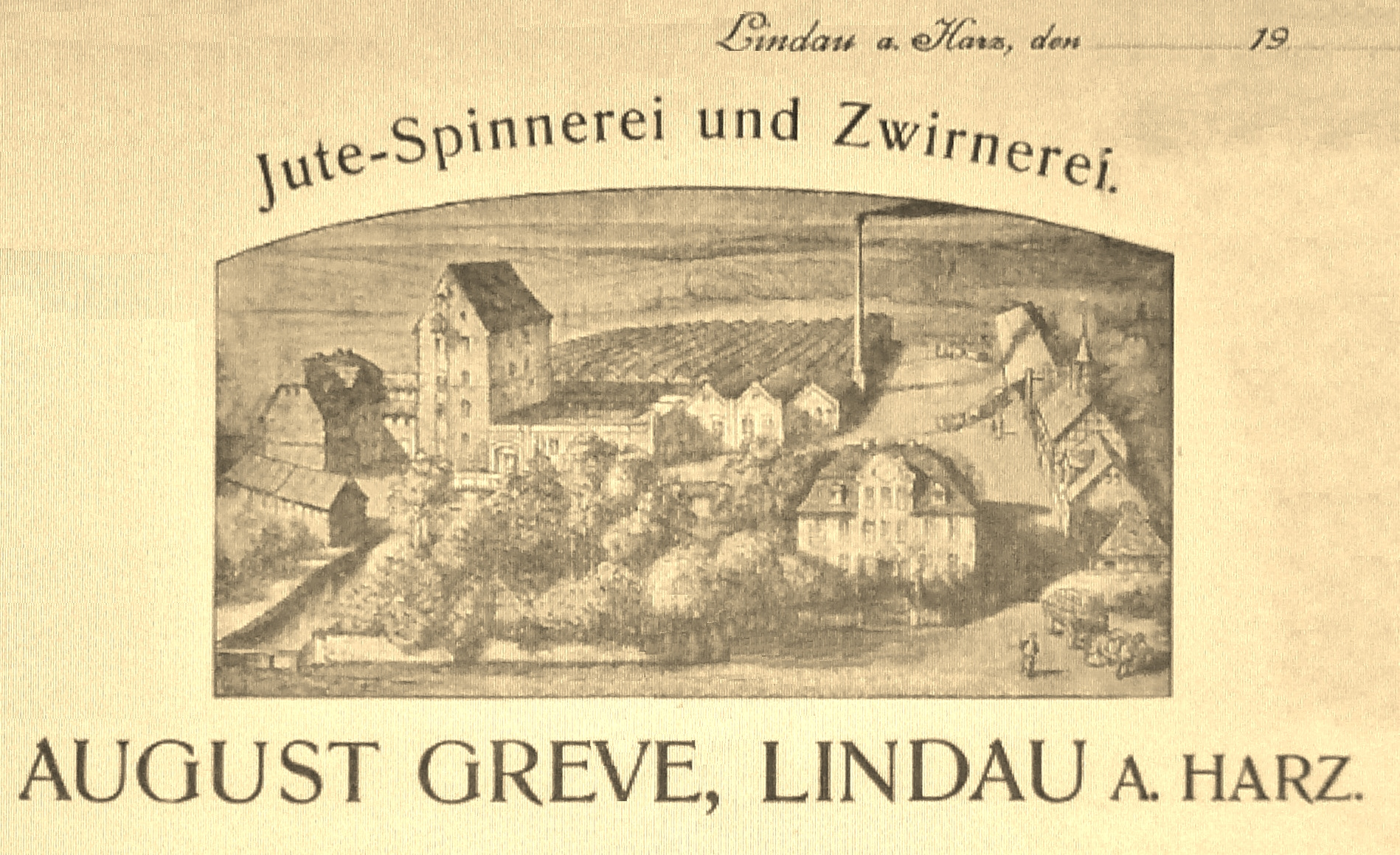 Jute Spinnerei und Zwirnerei August Greve in Lindau etwa 1910